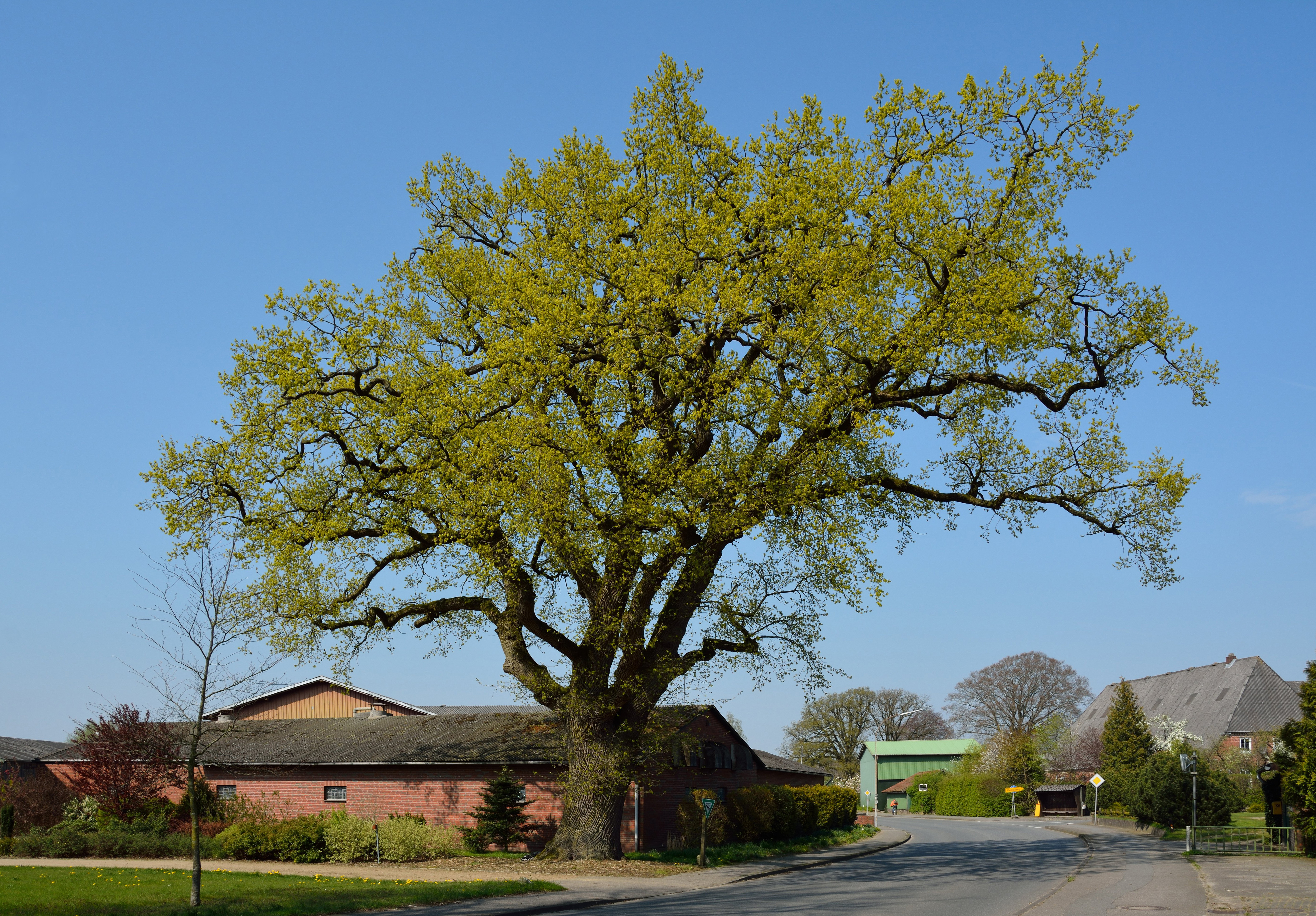 Naturdenkmal Nummer 2 im Kreis Steinburg: Mehrhundertjährige Eiche an der Dorfstraße 19 in Lockstedt